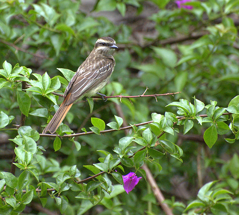 Parque da Indepedência, Museu do Ipiranga, São Paulo